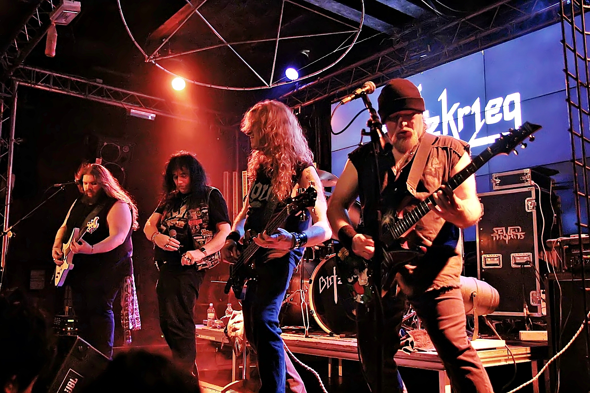 Blitzkrieg im Dezember 2018